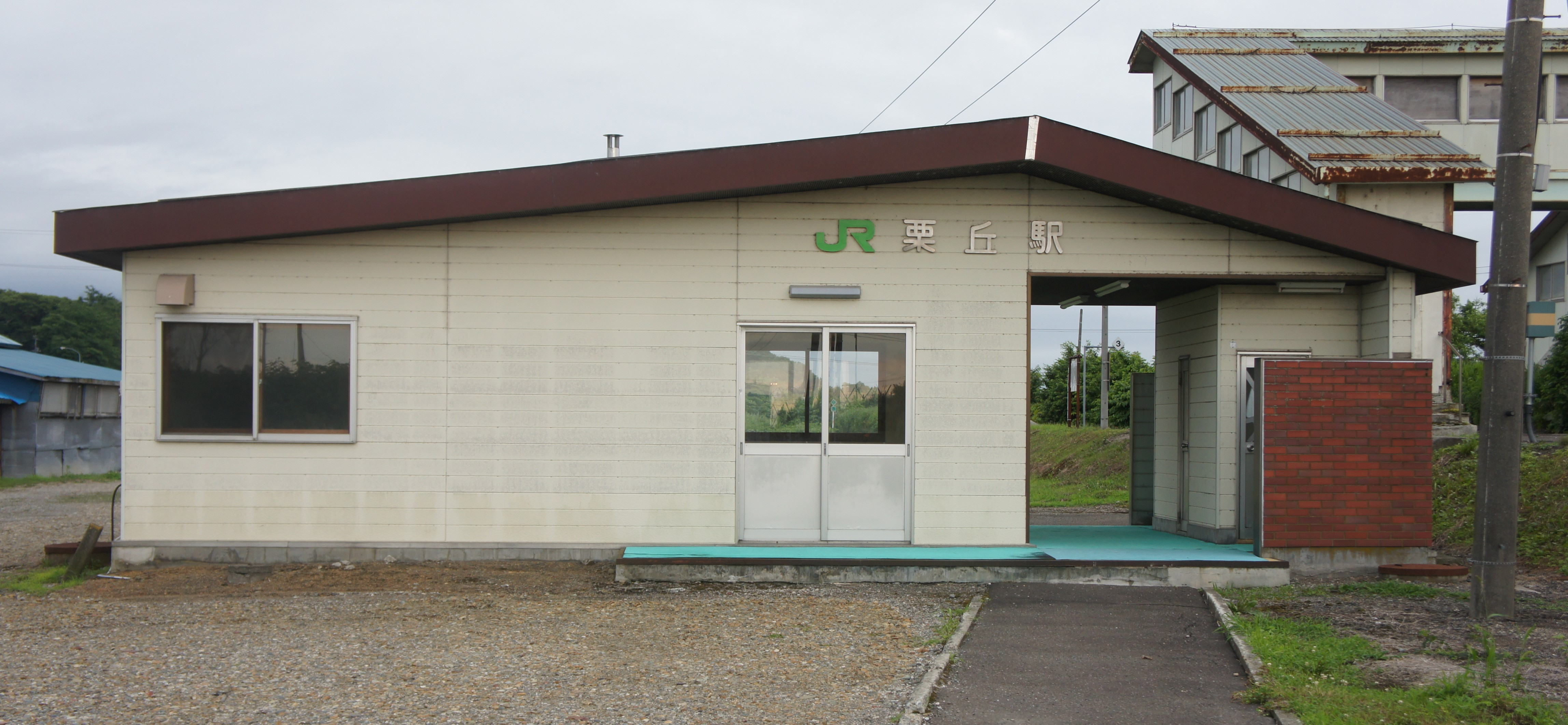 JR室蘭本線・栗丘駅の駅舎